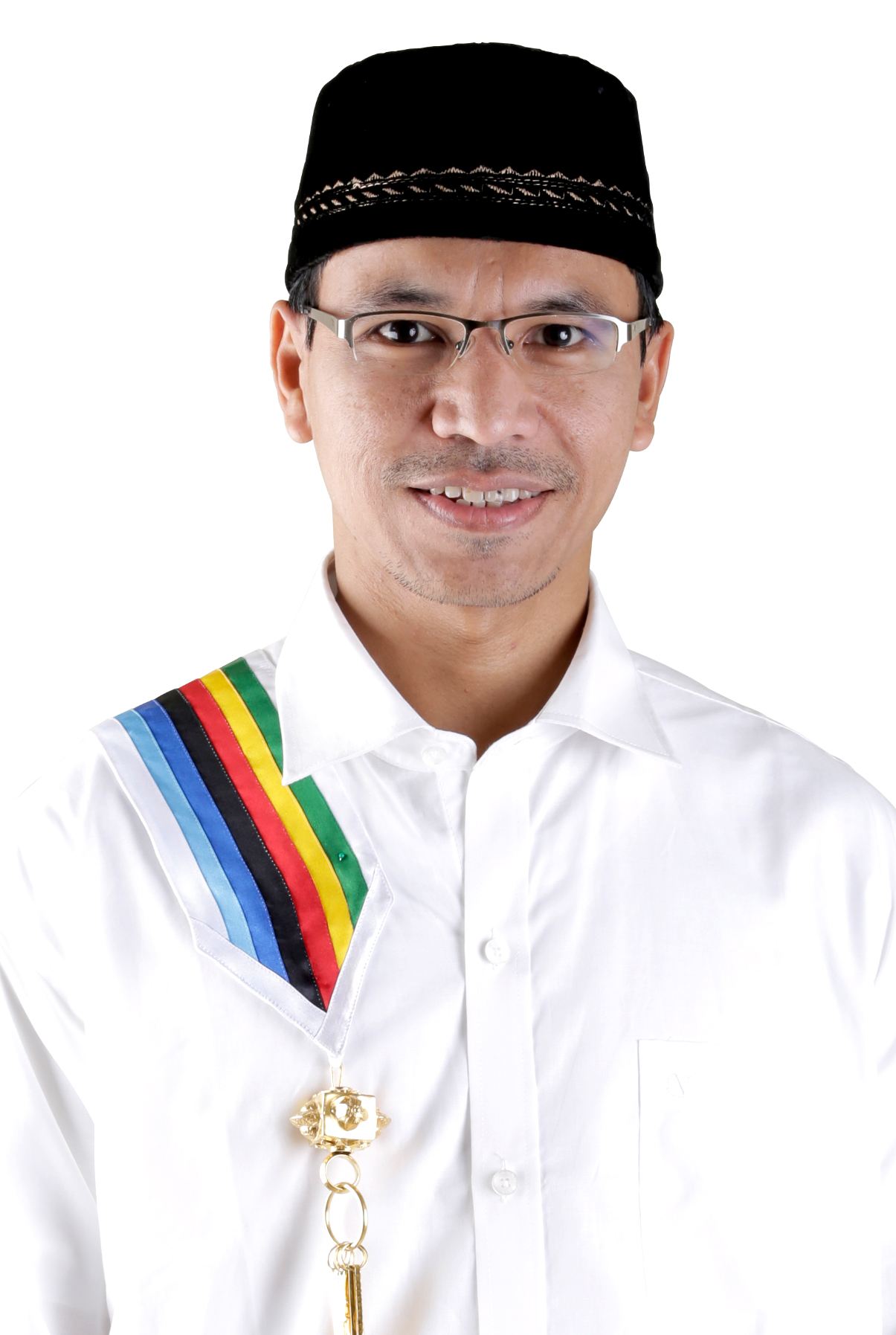 Farid Nyak Umar